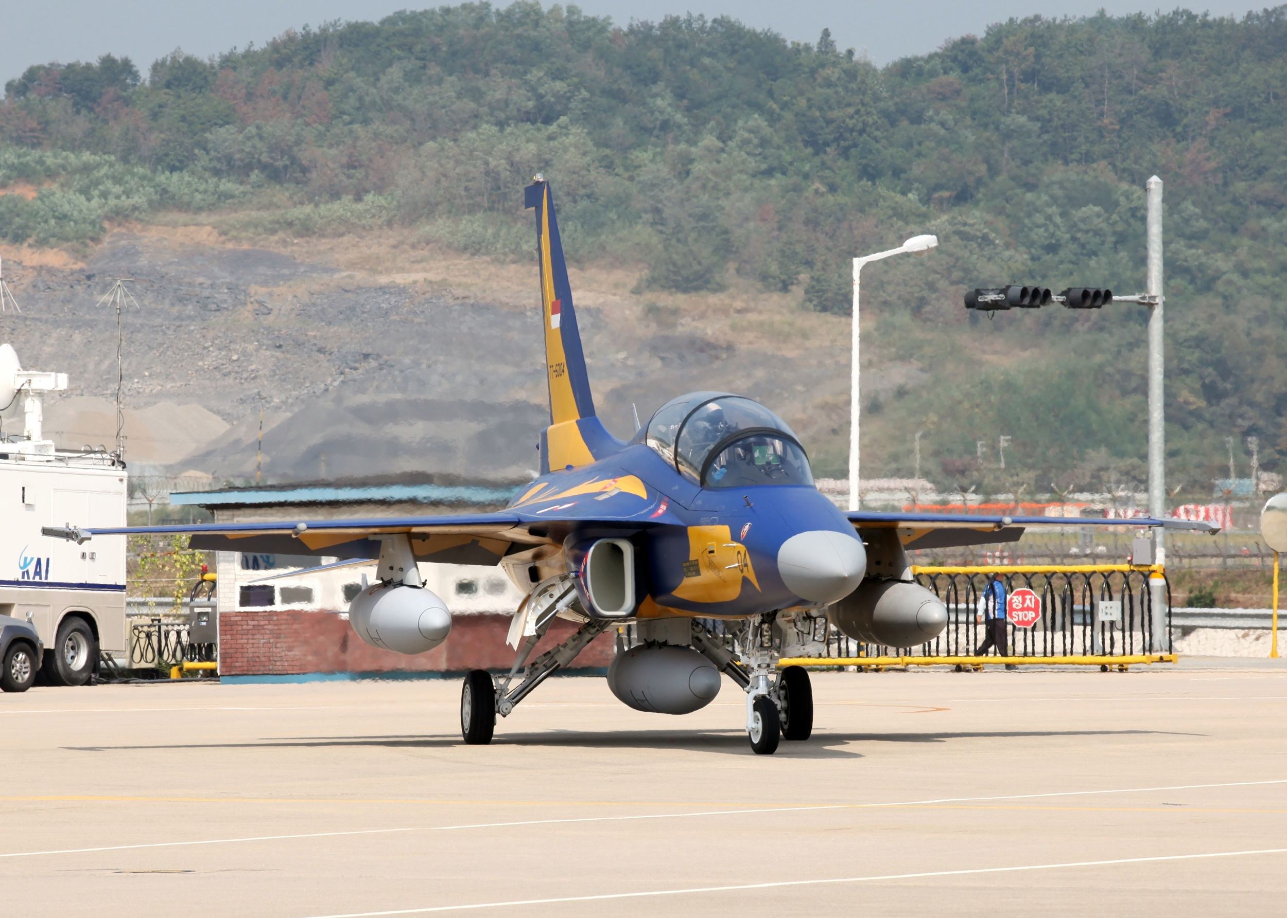 T-50i 인도네시아 공군 버전